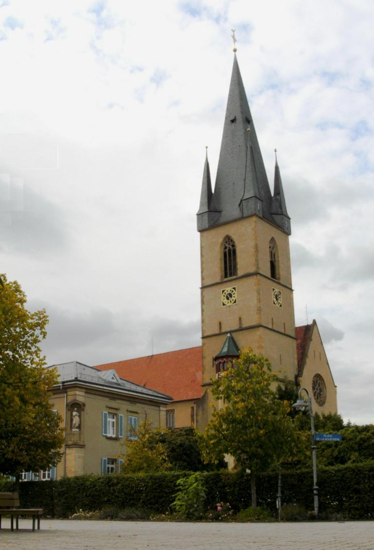 Pfarrkirche St.Remigius in D-76707 Hambrücken, Germany